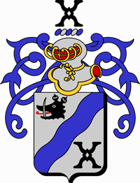 Blason de Johannes Nolet de Brauwere van Steeland